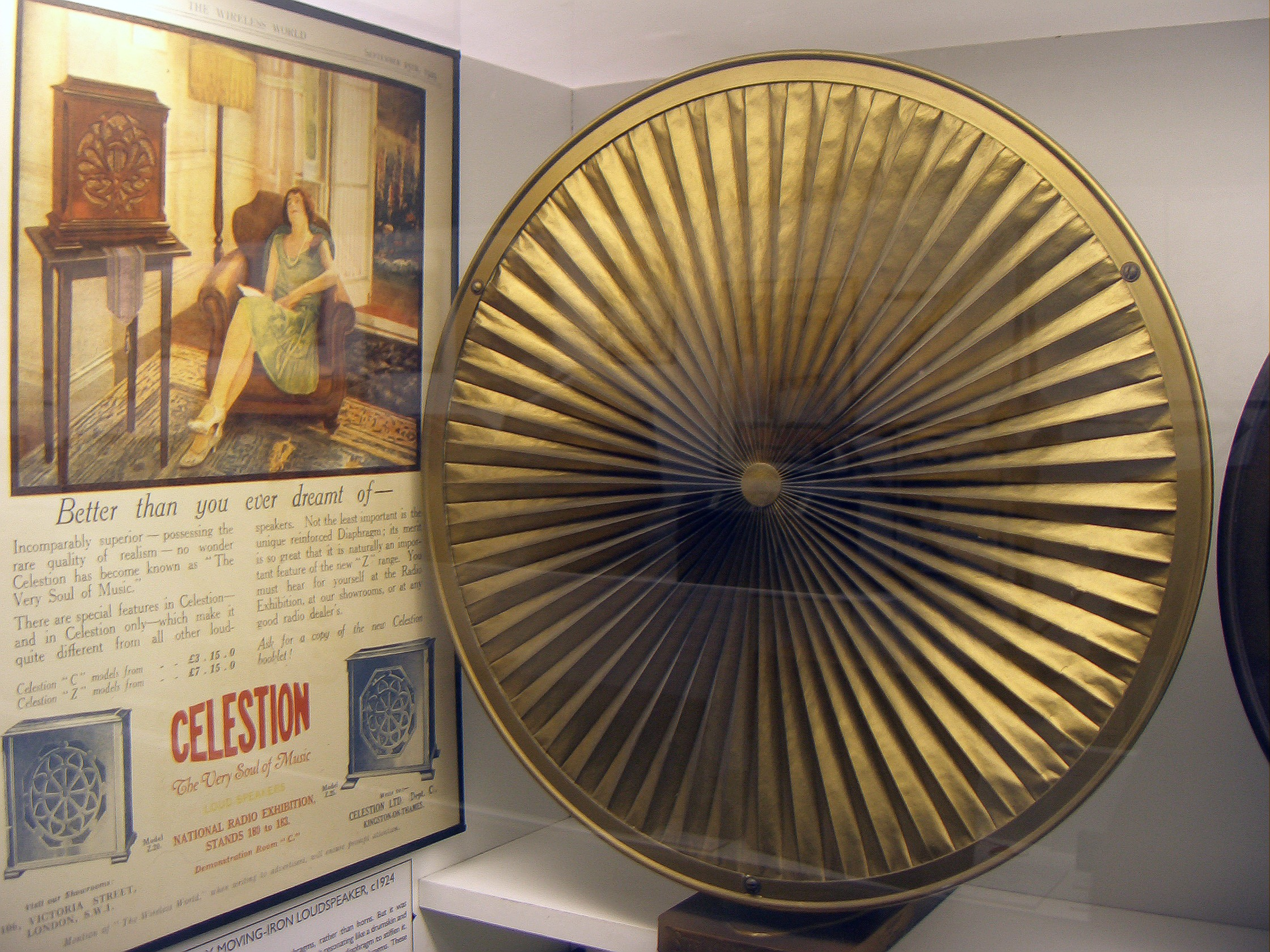 Historischer Lautsprecher Celestion, Science Museum, South Kensington, London, UK